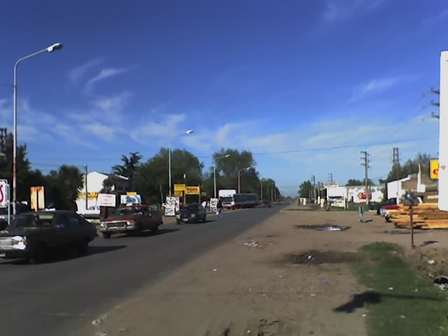 Ruta Provincial 21 (Provincial Route 21), Merlo Partido, Buenos Aires Province.